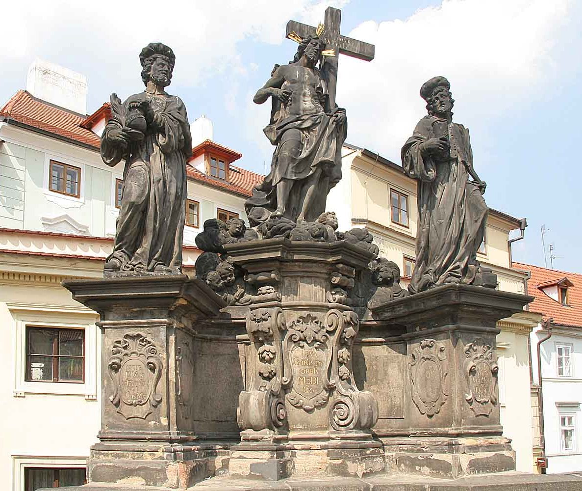 Česky: Sousoší Svatého Kosmy a Damiána na Karlově mostě